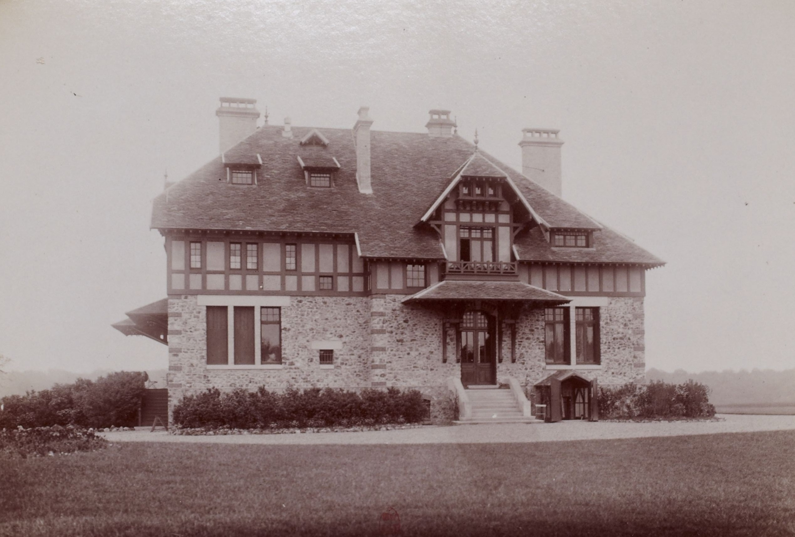 [Collection Jules Beau. Photographie sportive] : T. 29. AnnÃ©e 1905 / Jules Beau : F. 41v. Golf, SociÃ©tÃ© de Golf de Paris